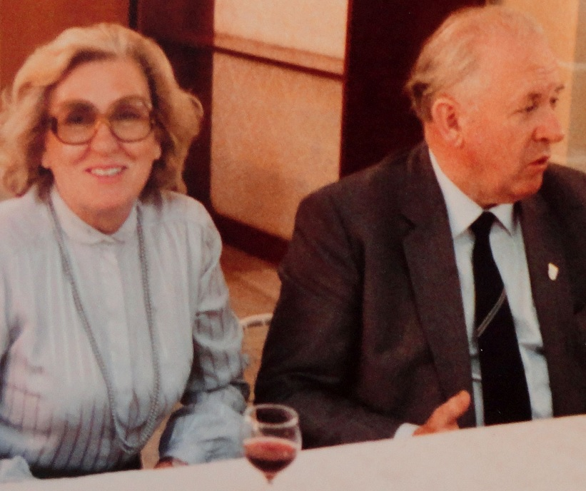 Alfred Kinzel mit Ehefrau, Schacholympiade 1980 in Valletta auf Malta.